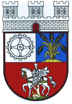 Wappen der Stadt Nortorf im Kreis Rendsburg-Eckernförde, Schleswig-Holstein.